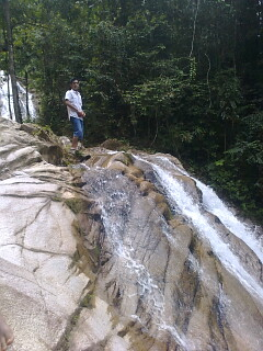 Air terjun paling menarik di sumatra air terjun memiliki banyak tingkatan sewaktu kami berkunjung kami hanya bisa akses sampai tingkat ke tujuh. sungguh pemandangan yang sangat luar biasa. udara dan alam sangat sejuk. untuk mengakses ini kita hanya butuh waktu 30 menit dari permukiman desa telentam.